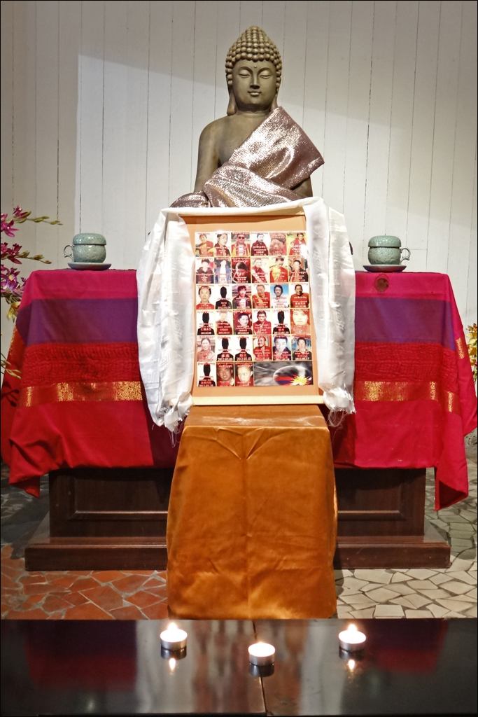 La pagode du bois de Vincennes a été installée dans l’ancien pavillon du Cameroun, un des vestiges de l’exposition coloniale de 1931 (architecte : Louis-Hippolyte Boileau) qui a été restauré. Elle abrite le plus grand Bouddha d’Europe qui est recouvert de feuilles d’or et mesure, avec son socle, plus de 9 mètres de haut. Dans l’enceinte de la pagode de Vincennes fut également construit entre 1983 et 1985 le temple bouddhiste tibétain de Kagyu-Dzong. La pagode de Vincennes est occupée par diverses obédiences des écoles bouddhiques de la région parisienne Article de Wikipedia sur le site Article de Wikipedia